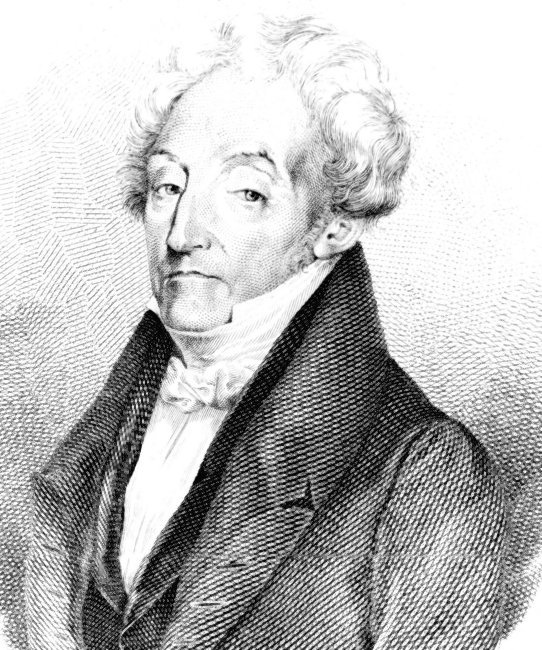 Ritratto di Giovanni Rasori. Incisione di Beretta del 1837 su disegno dal vero di De Marchi.